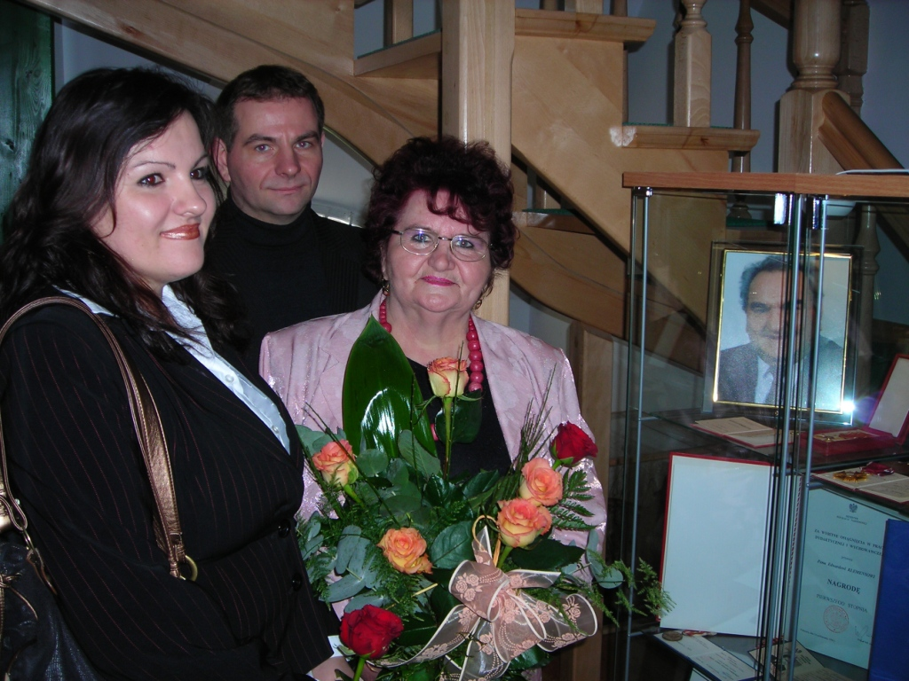 żona i dzieci Edwarda Klemensa na uroczystości nadania muzeum etnograficznemu w Jeleniu jego imienia